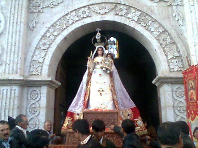 foto de la virgen de la Candelaria de Characato, el domingo de resurrección año 2008